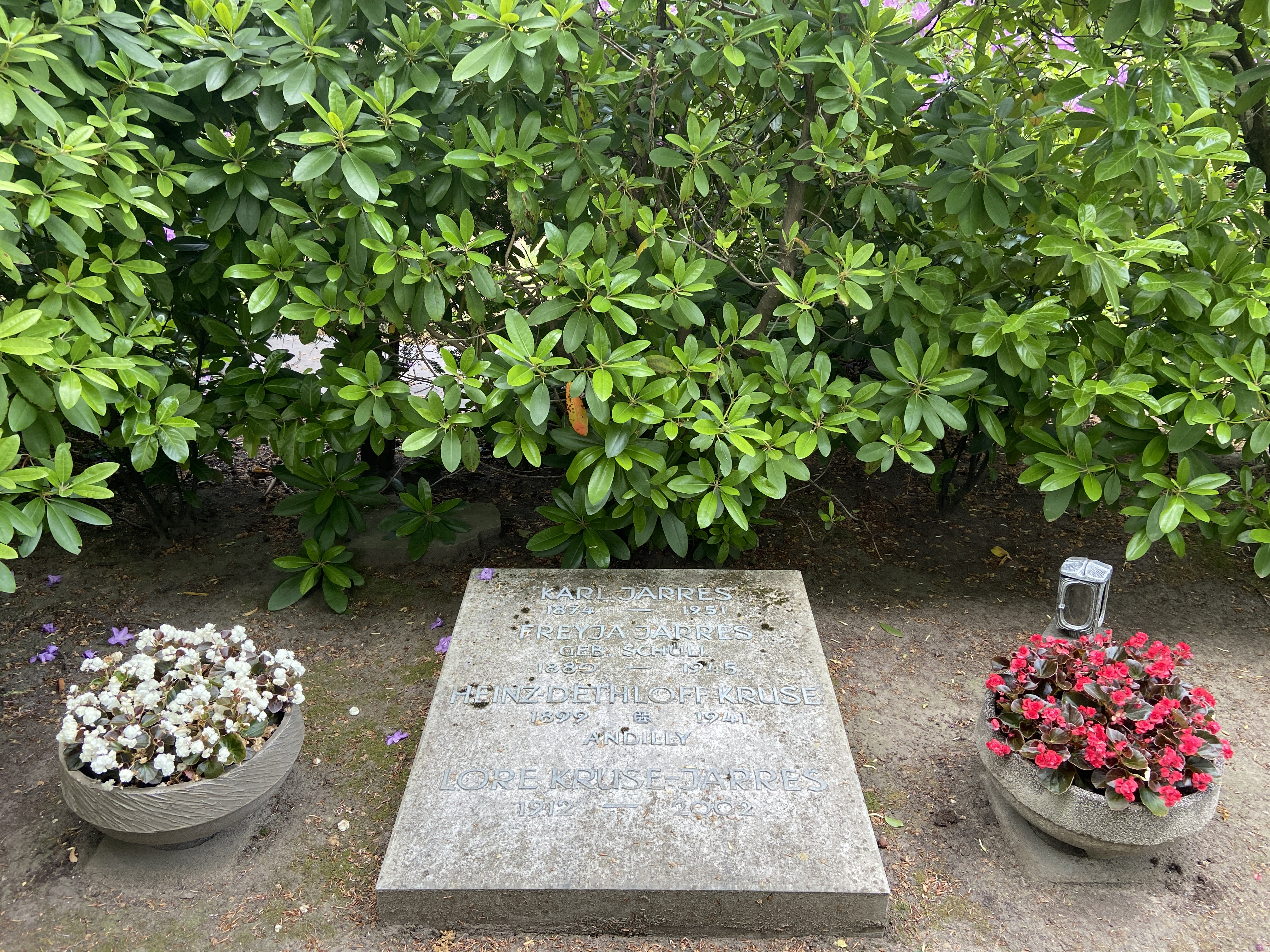 Grabstelle des Duisburgers Karl Jarres